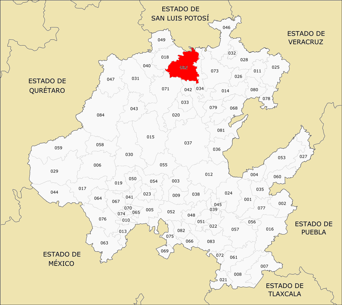 Municipio de Hidalgo